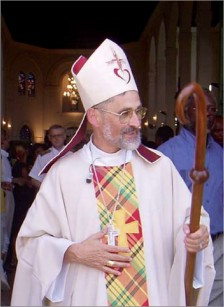 Monseigneur Emmanuel Lafont, évêque de Cayenne et figure de la lutte contre l'apartheid.